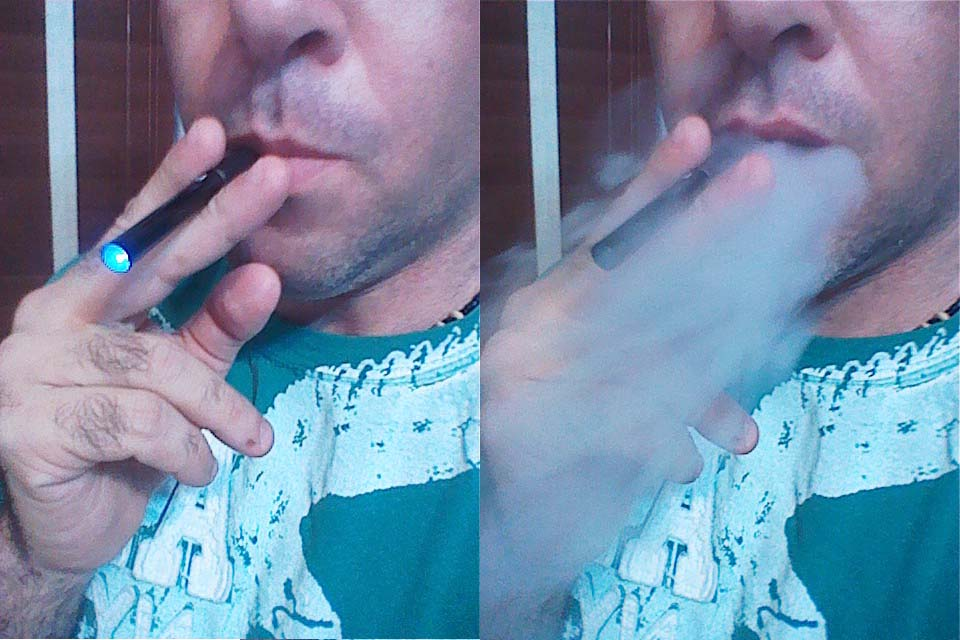 Funcionamiento y niveles de produccion de vapor de un cigarrillo electronico